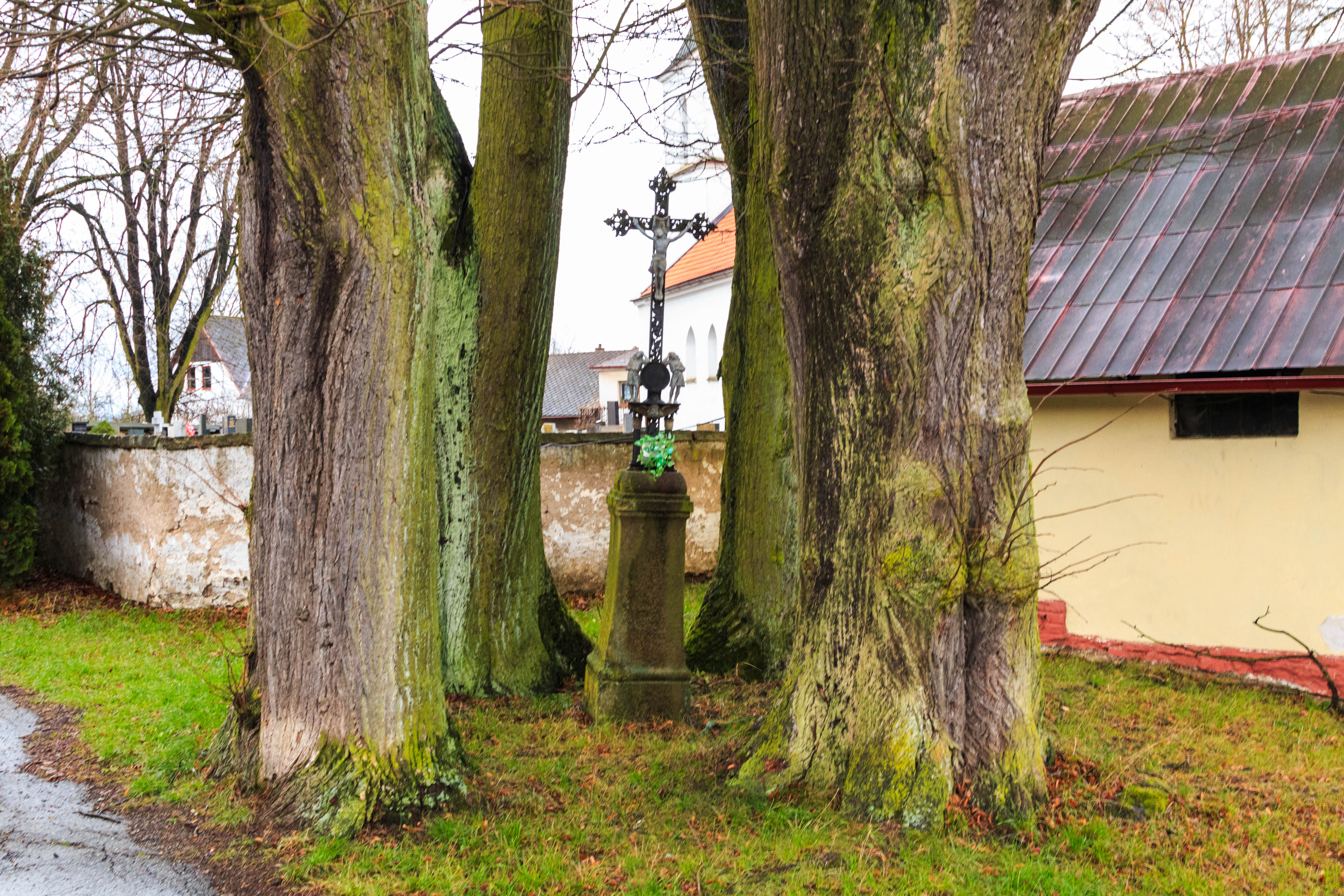 Kněž křížek